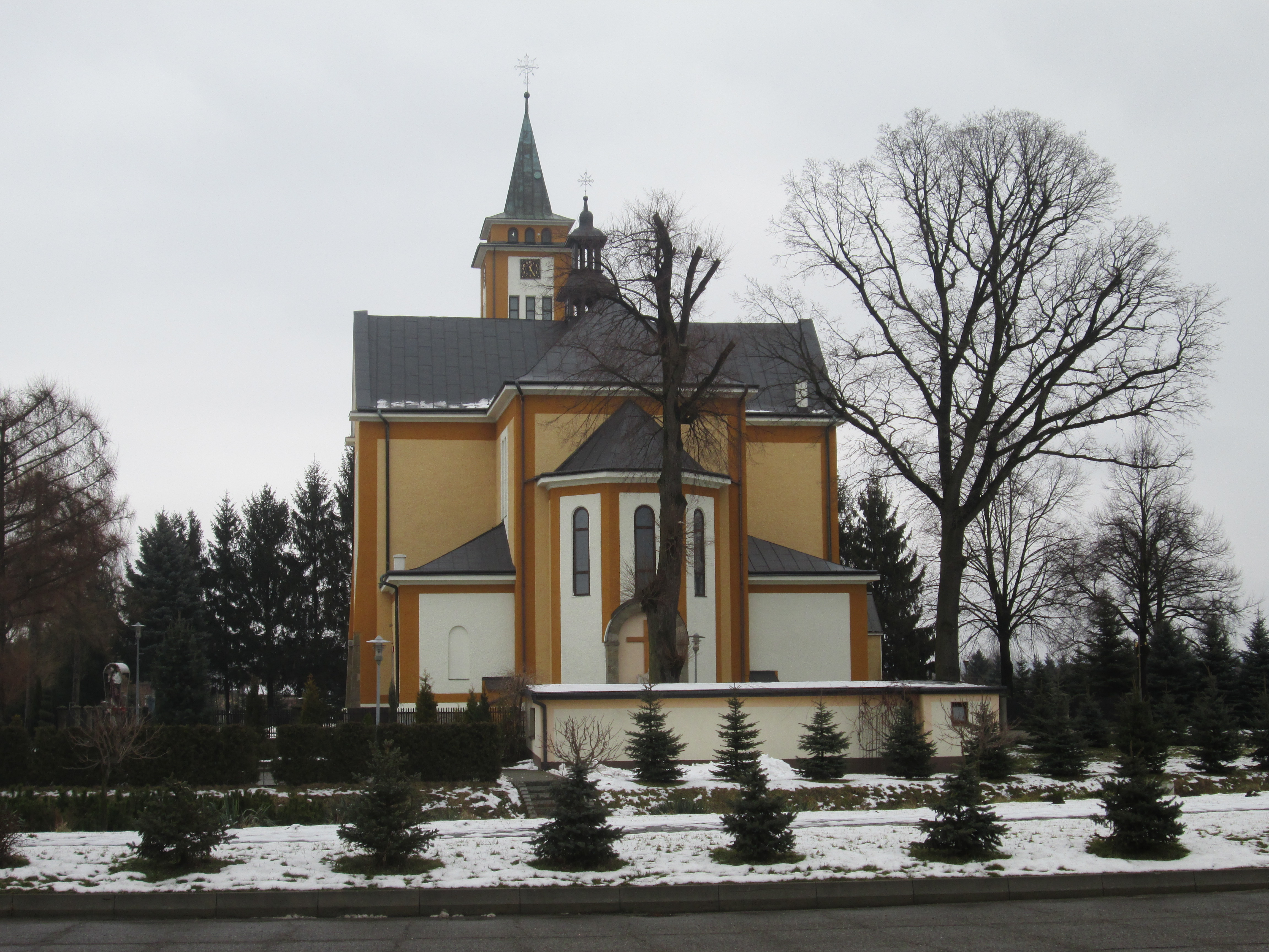 Kościół Wszystkich Świętych w Straszęcinie